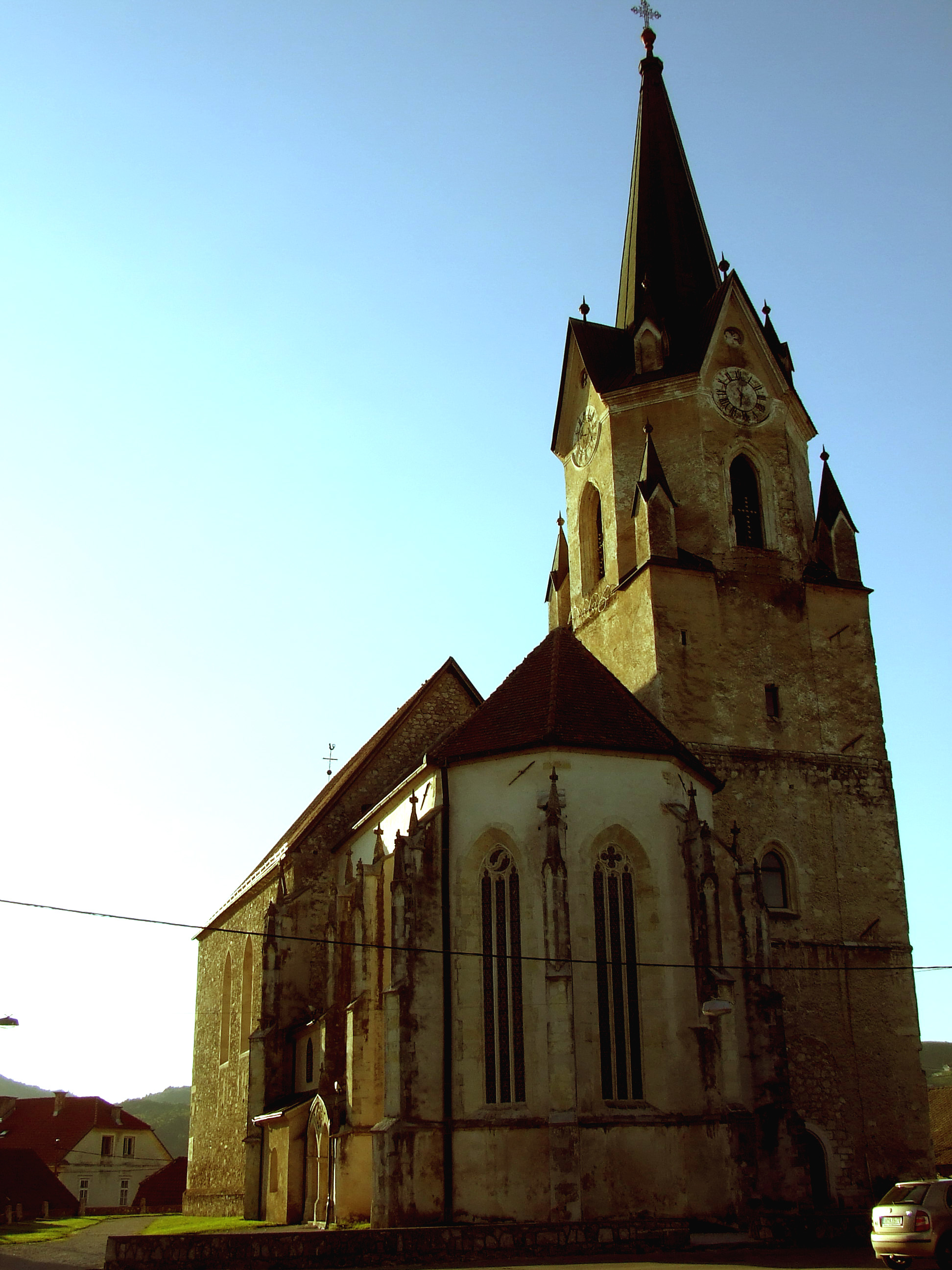 župnijska cerkev Sv. Ruperta v Šentrupertu na Dolenjskem, dominira nad okolici in stoji v samem trškem jedru tega kraja. Avtorica: Ines Zgonc